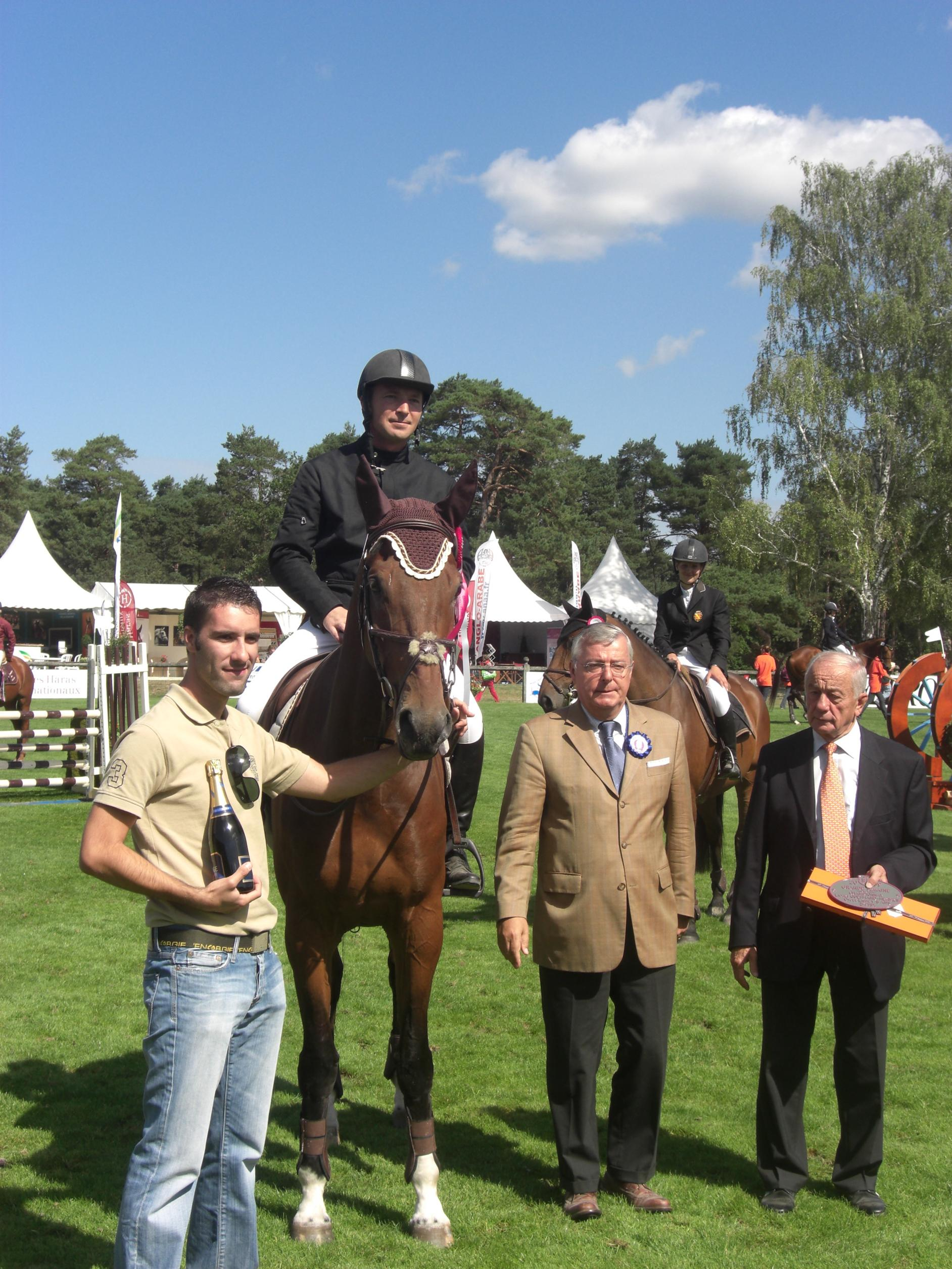 Qualisto de la Dore, son cavalier Nicolas TEISSEDRE, et son co-propriétaire Marco DA CRUZ